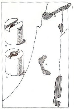 סוג של בורג כבישה לפי תפוצתו בארץ